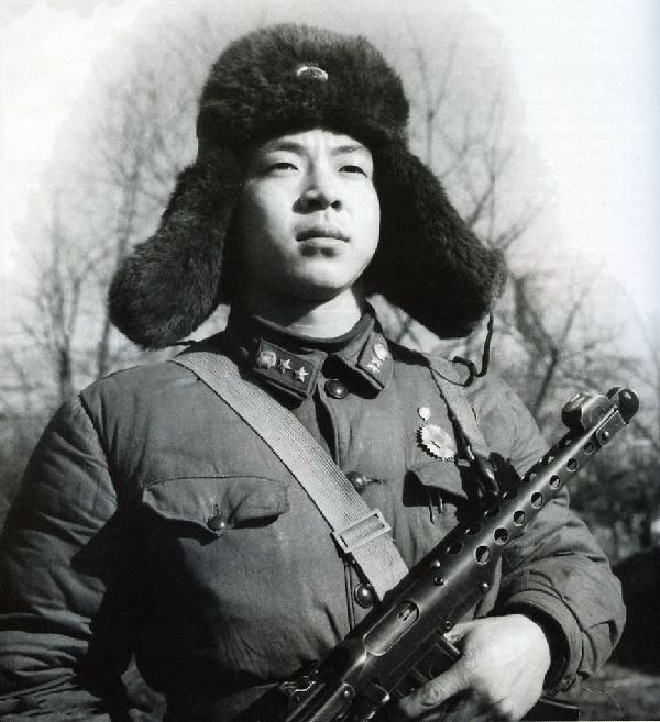 持枪的雷锋